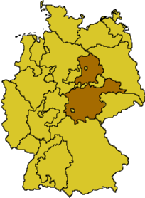 Gebiet der Evangelischen Kirche in Mitteldeutschland